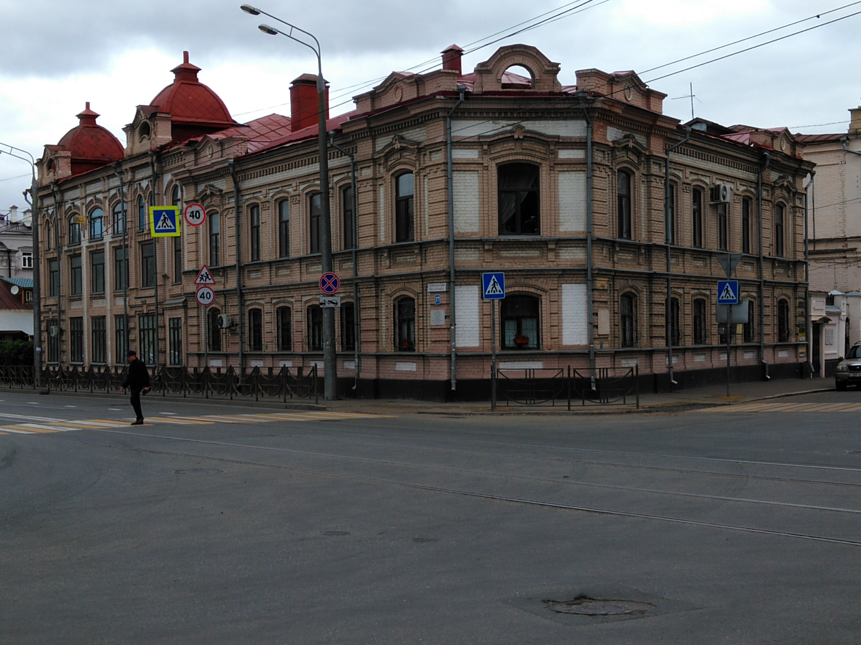 Дом, в котором помещалась типография органа казанского комитета РСДРП(б) газеты Рабочий: улица Парижской коммуны, 20, Казань, Татарстан